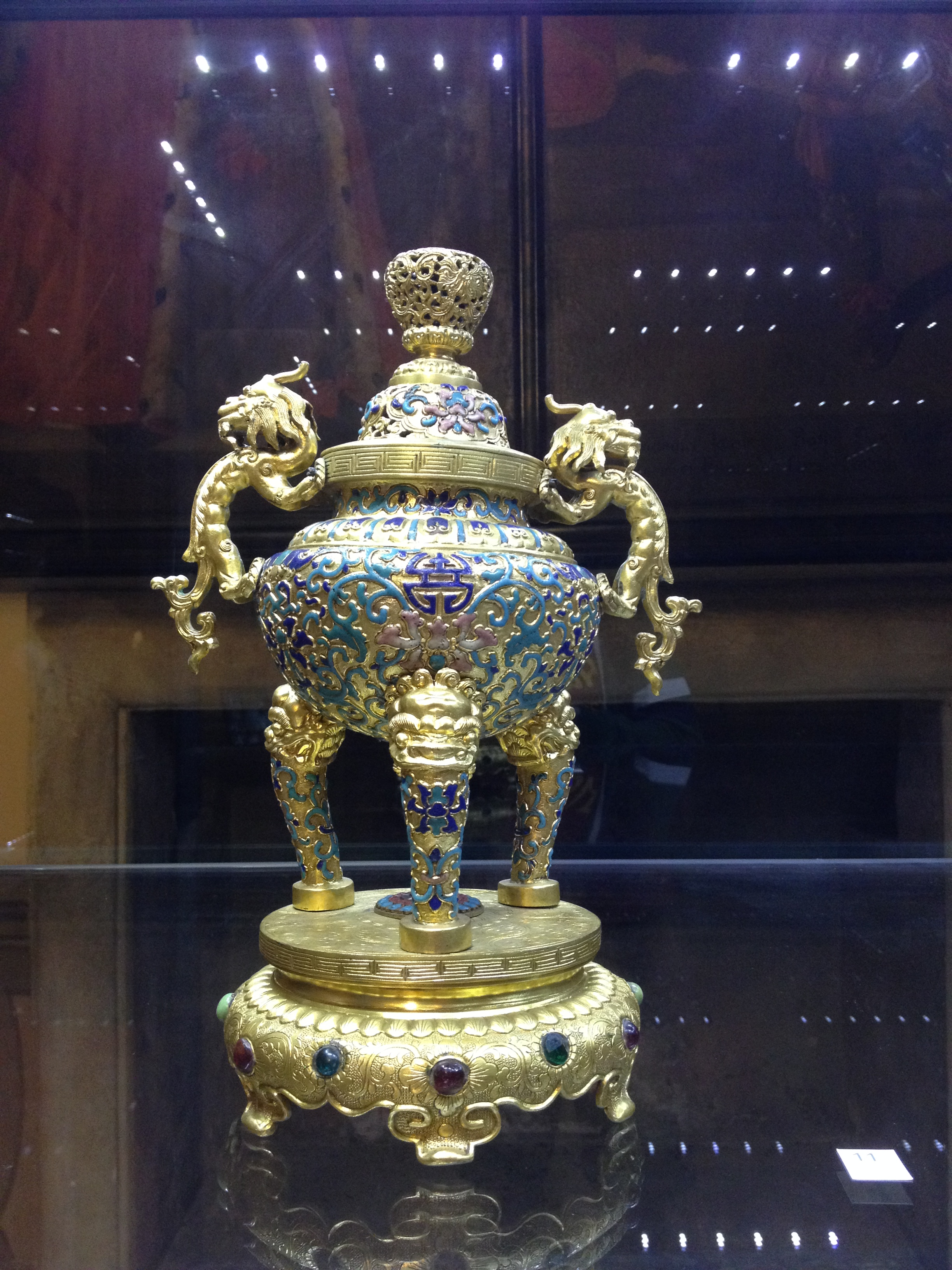 Bruciaprofumi - Manifattura cinese 1736-1795 - Museo Duca di Martina di Napoli